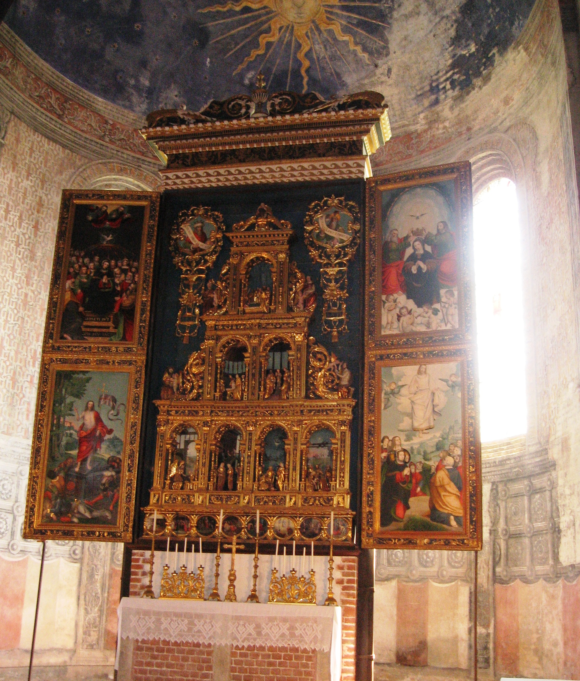 Revello. Cuneo. Abbazia cistercense di Staffarda. Polittico dell'Altar Maggiore. Secolo XVI.